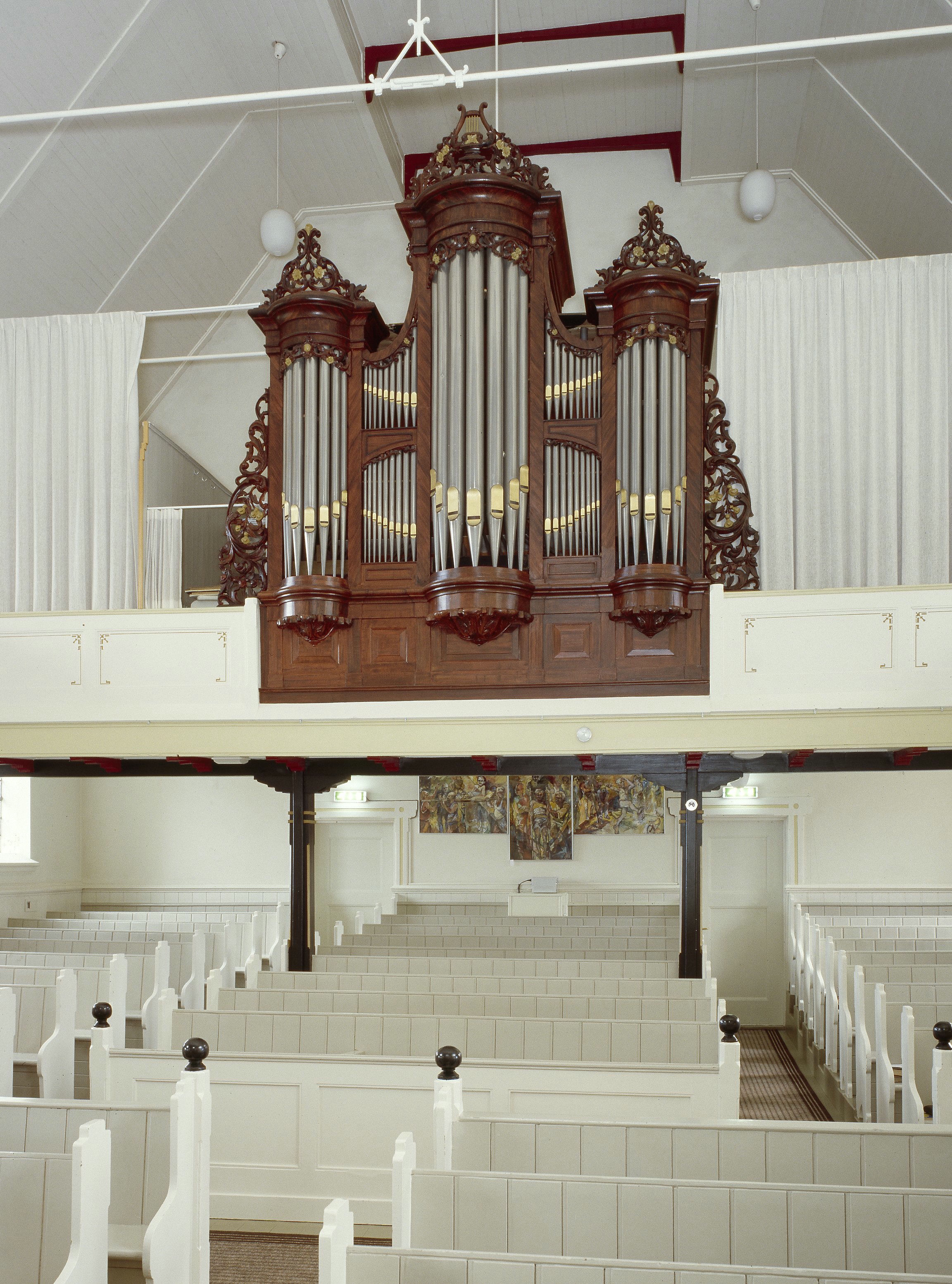 Gereformeerde Kerk: Interieur, aanzicht orgel, orgelnummer 499 (opmerking: Gefotografeerd voor Het Historische Orgel in Nederland 1894-1901, bladzijde 287)